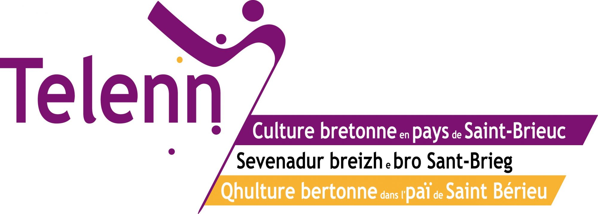 Logo de Telenn Ti ar Vro Bro Sant Brieg L'Ôté